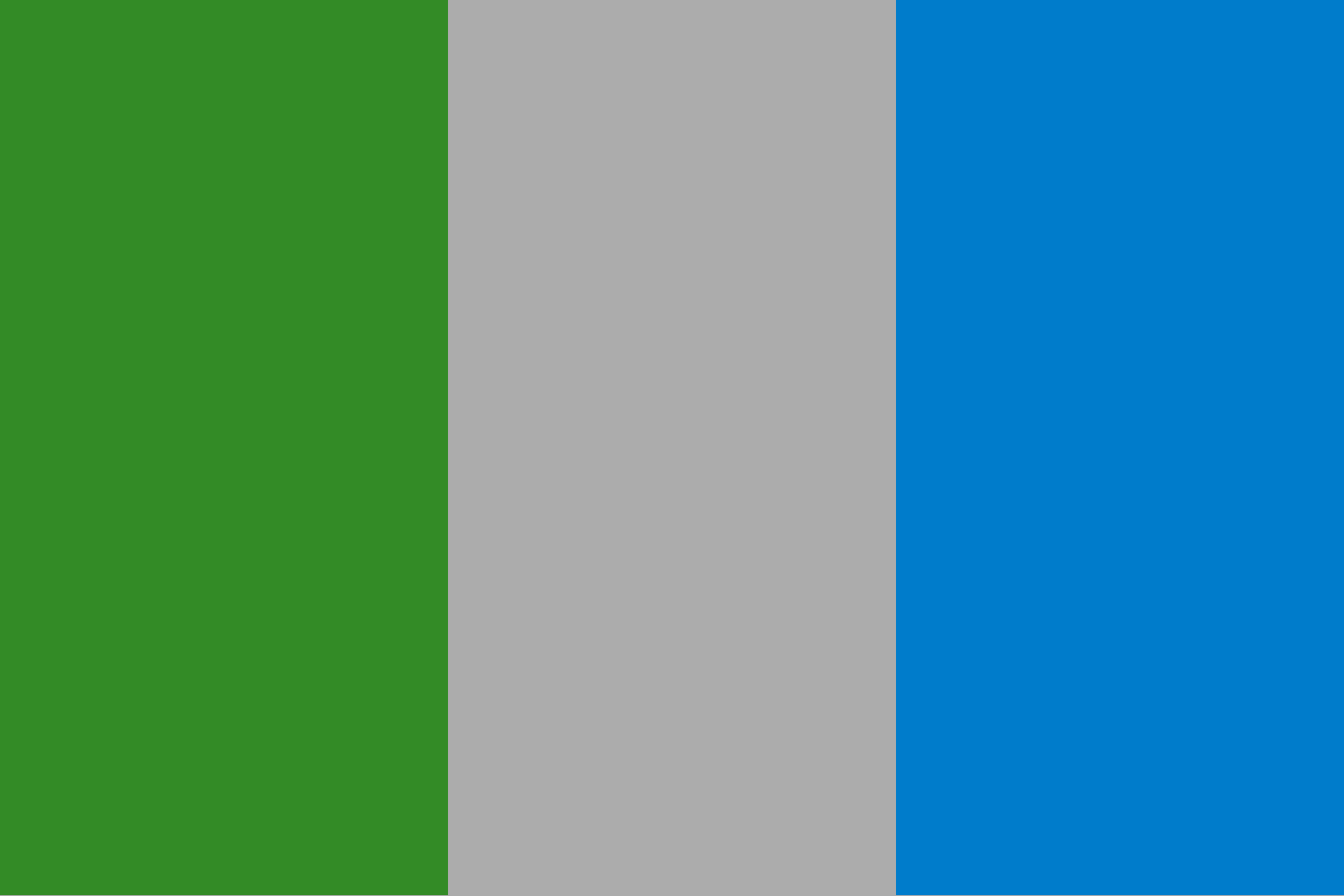 Bandera de la Asociación para la Defensa de los Intereses de Cantabria (ADIC).